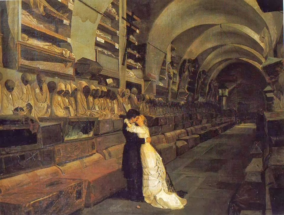 Calcedonio Reina - Amore e morte 1881 olio su tela, cm 119 x 149, firmato in basso a sinistra Cal(cedo)nio Reina Catania, Museo Civico Castello Ursino, inv. 7937